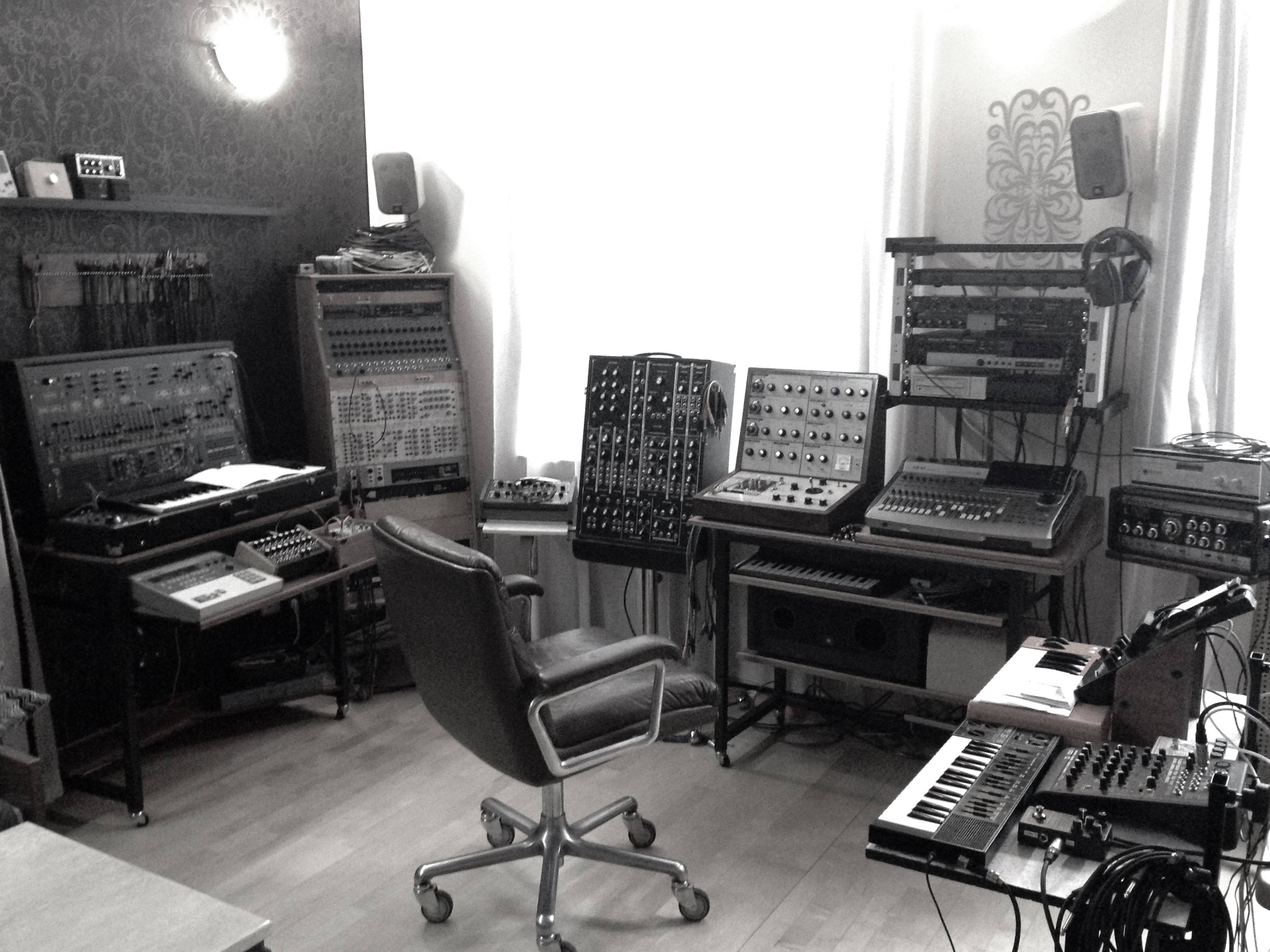 Irklis Studio Germany